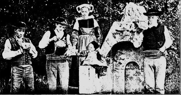 Fontaine miraculeuse sur la route de Rumengol sur la commune du Faou dans le département français du Finistère.